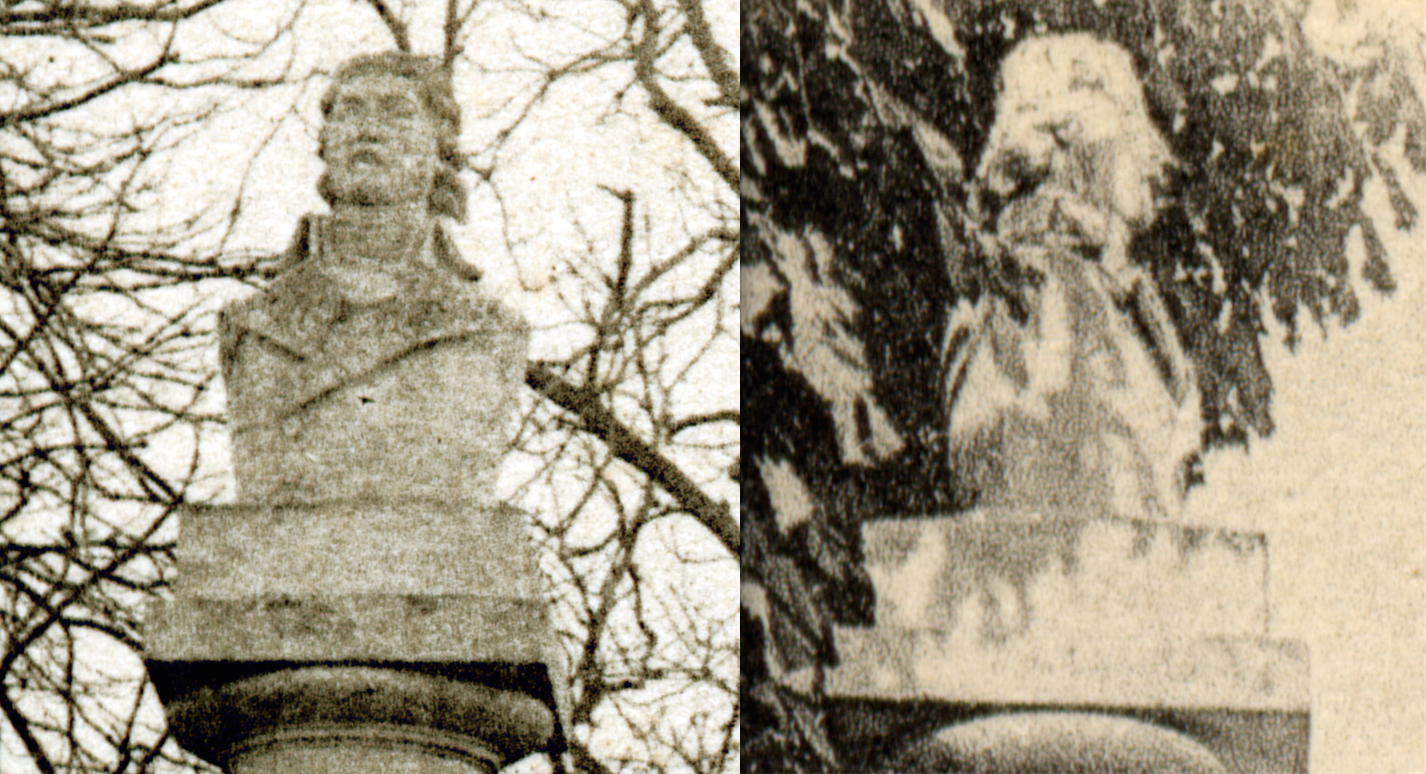 Photographie issue d'un travail personnel d'après un buste de Desaix qui couronnait la fontaine Desaix (Attiret) de Riom. Cette statue, représentée ici de face et de profil, a disparue depuis 1930.